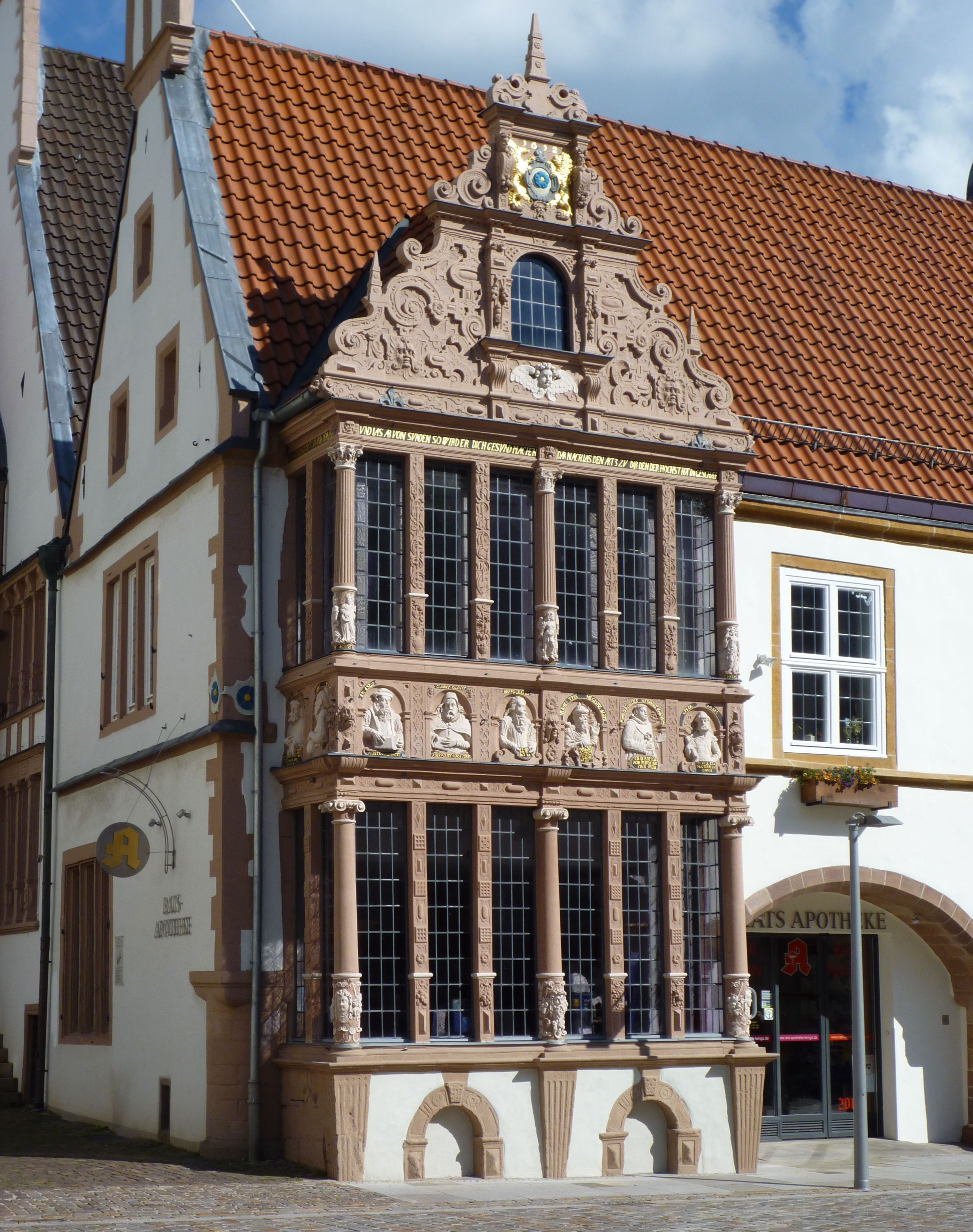 Lemgo - Rathauserker